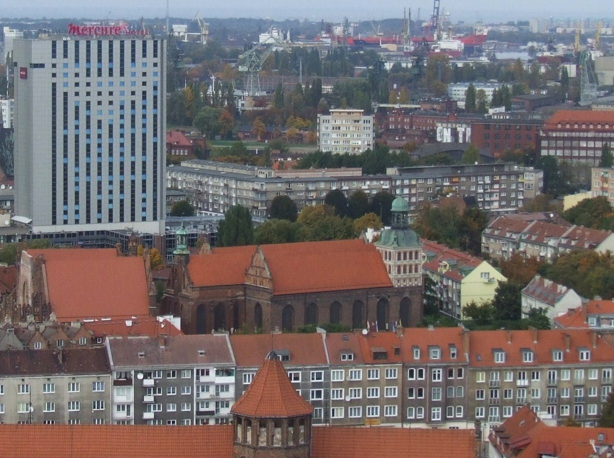 Stare Miasto w Gdańsku, kościół św. Brygidy.